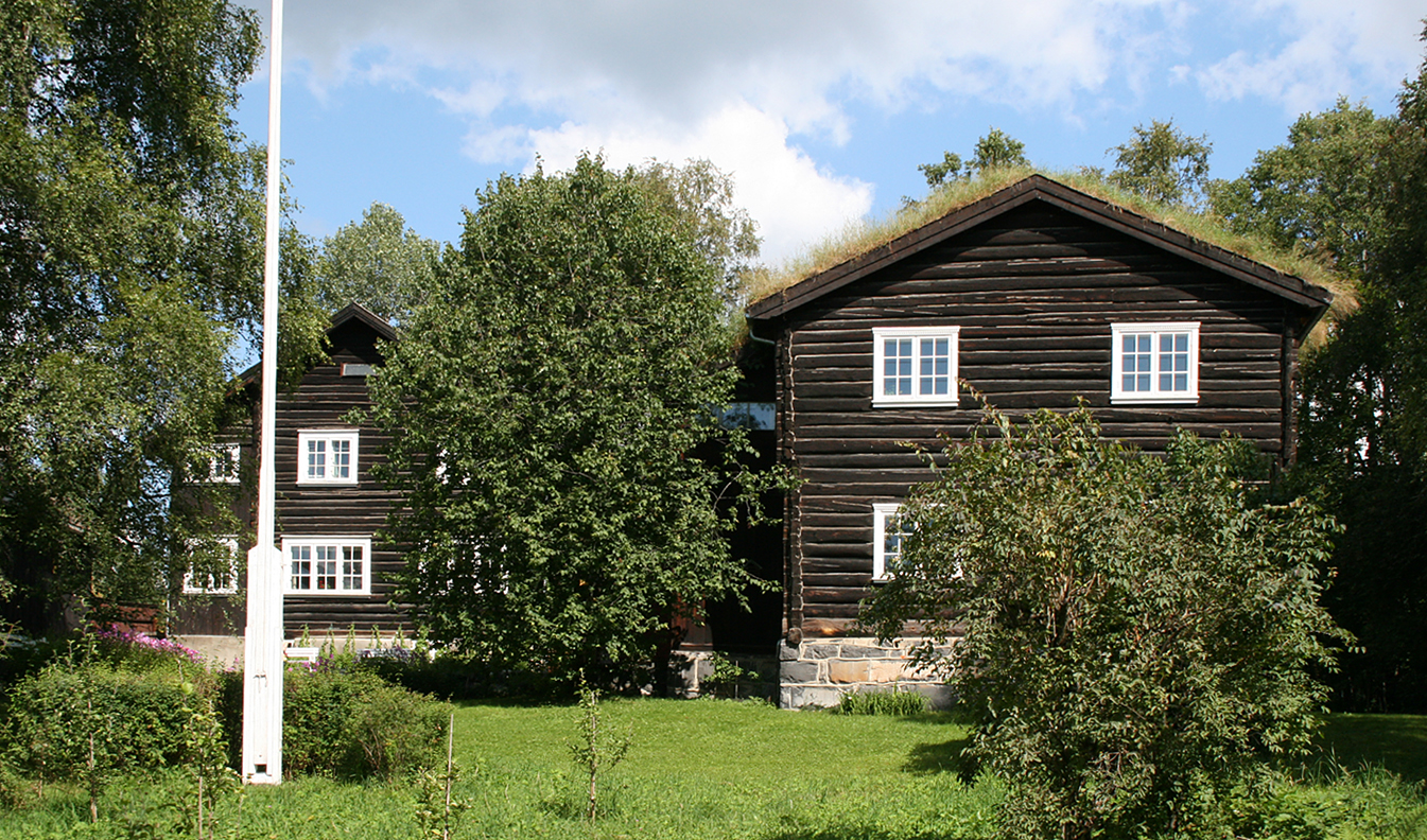 Bjerkebæk, Lillehammer. Til venstre Røssumstua. Til høgre Dalseggstua - stue fra klokkergården Dalsegg i Sør-Fron, gjenreist på Bjerkebæk 1924. Begga freda 1982.